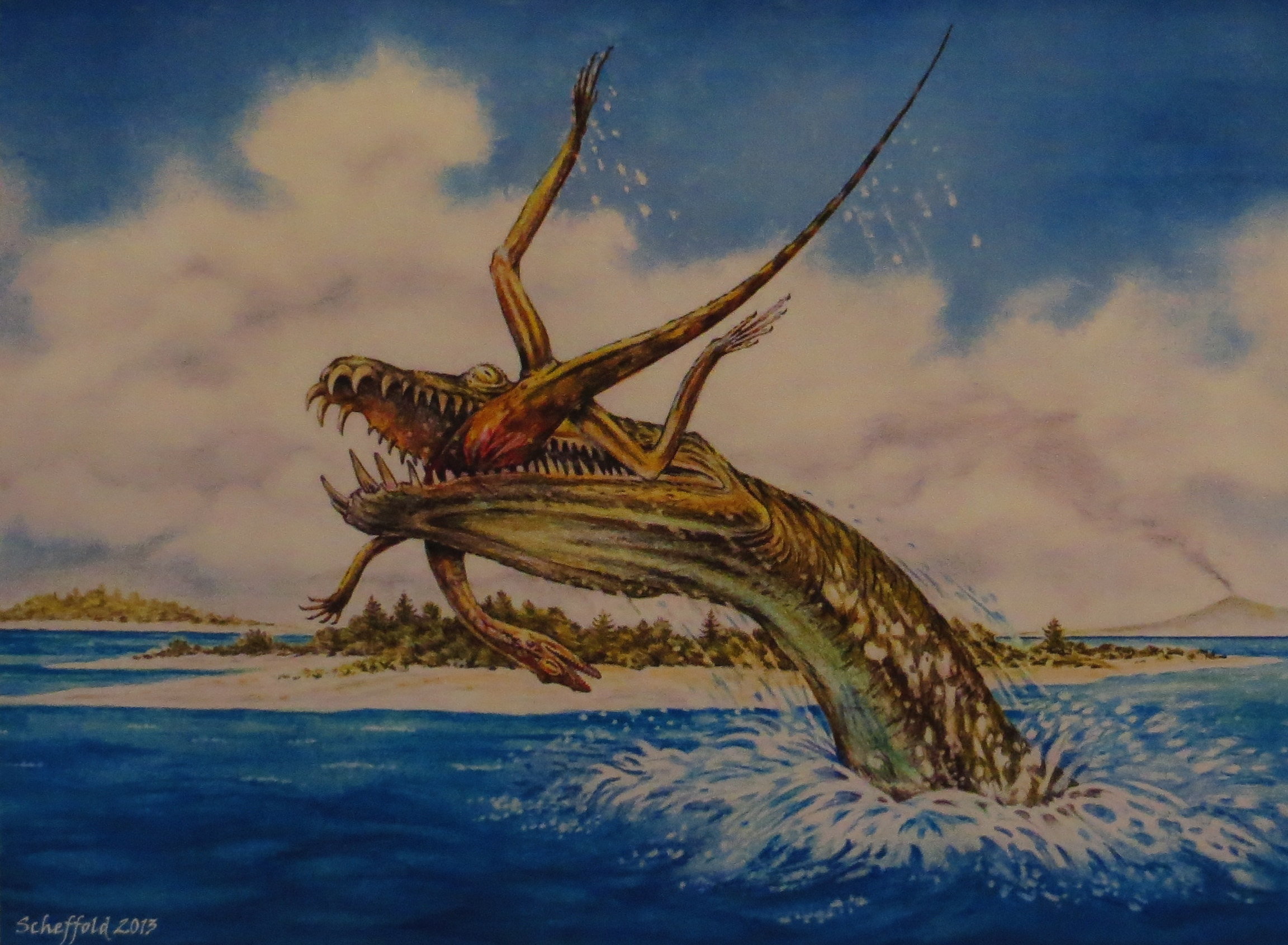 Restoration - Took the picture at Museum of Paleontology, Zurich